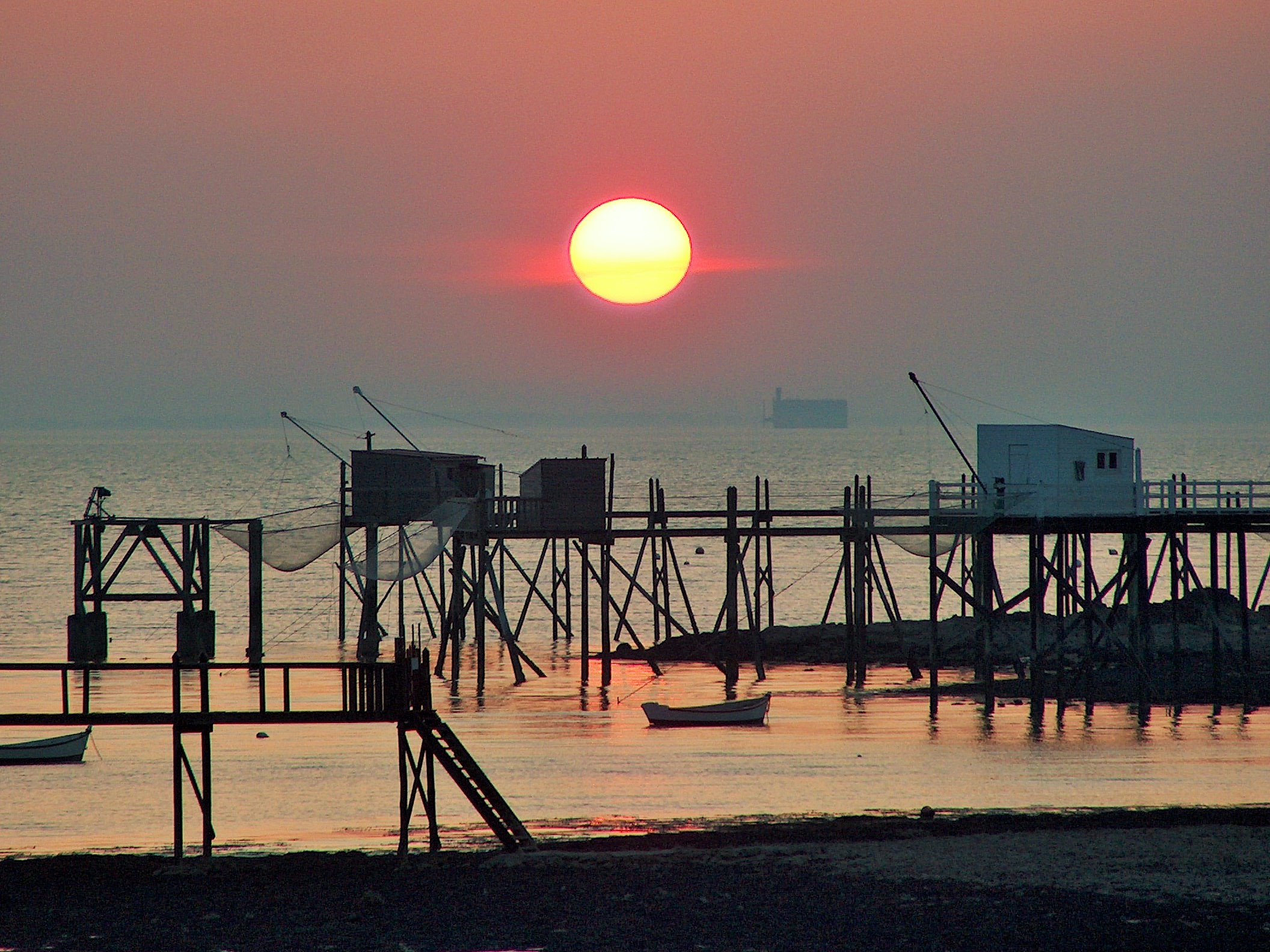 Cabanes à carrelet Fouras, Charente maritime